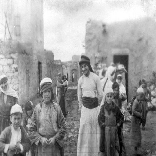 טיול קבוצתי של ציונים בגרמניה לארץ ישראל ב- 1913. צמח (Semakh). צלם אלברט בר